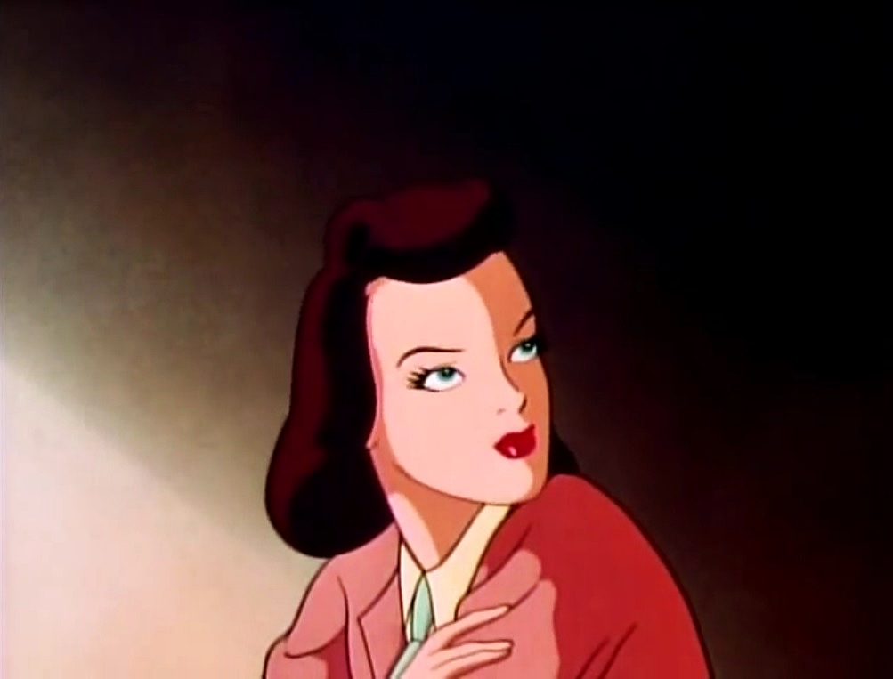 Imagen de la película El terremoto eléctrico que muestra a Lois Lane.